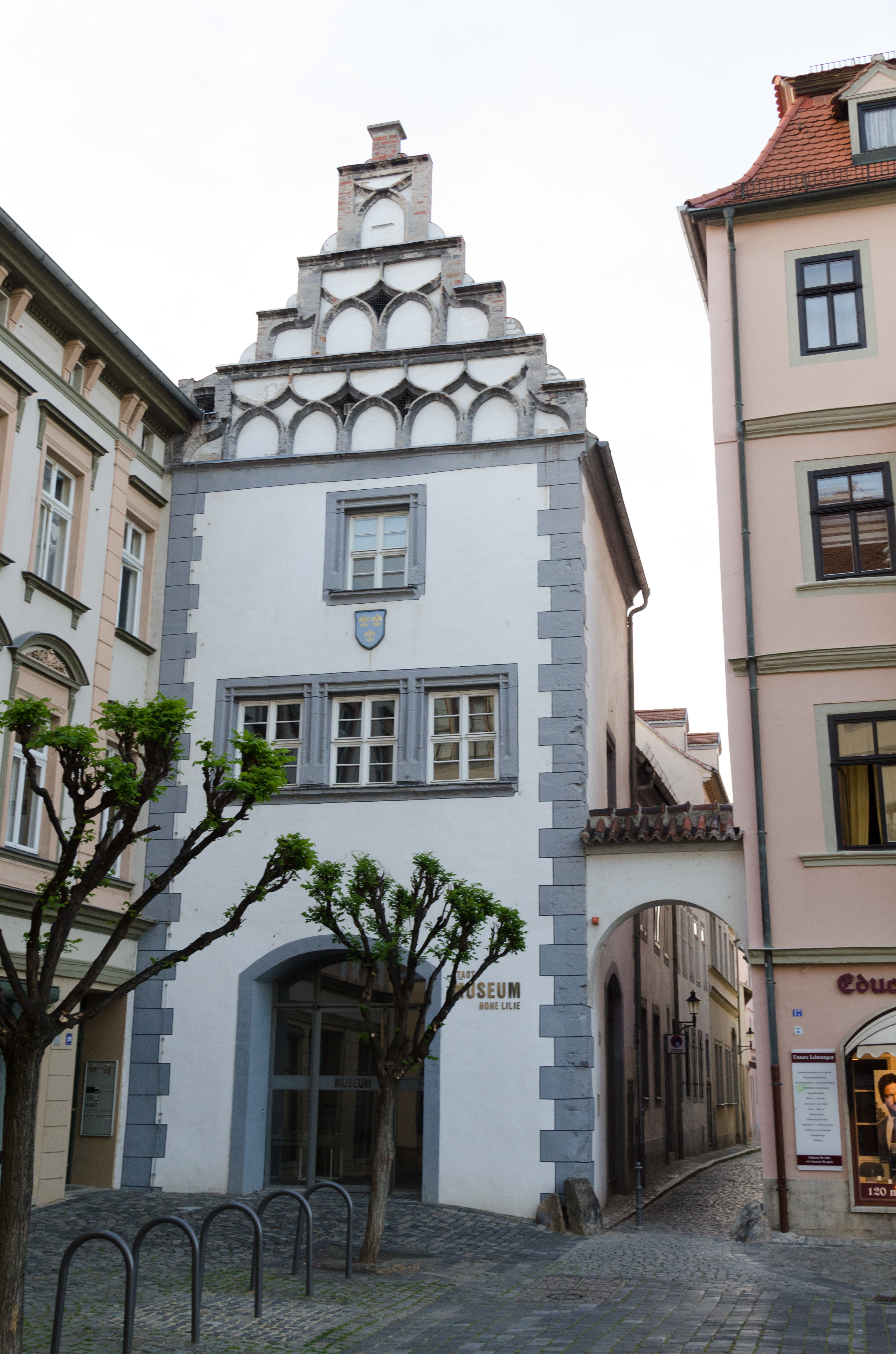 Naumburg, Markt 18